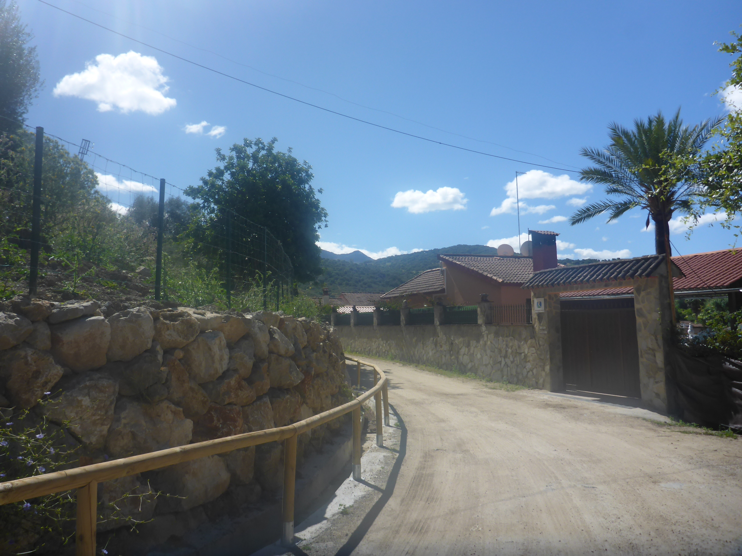 Poblado de Tavizna en Benaocaz (Andalucía, España)